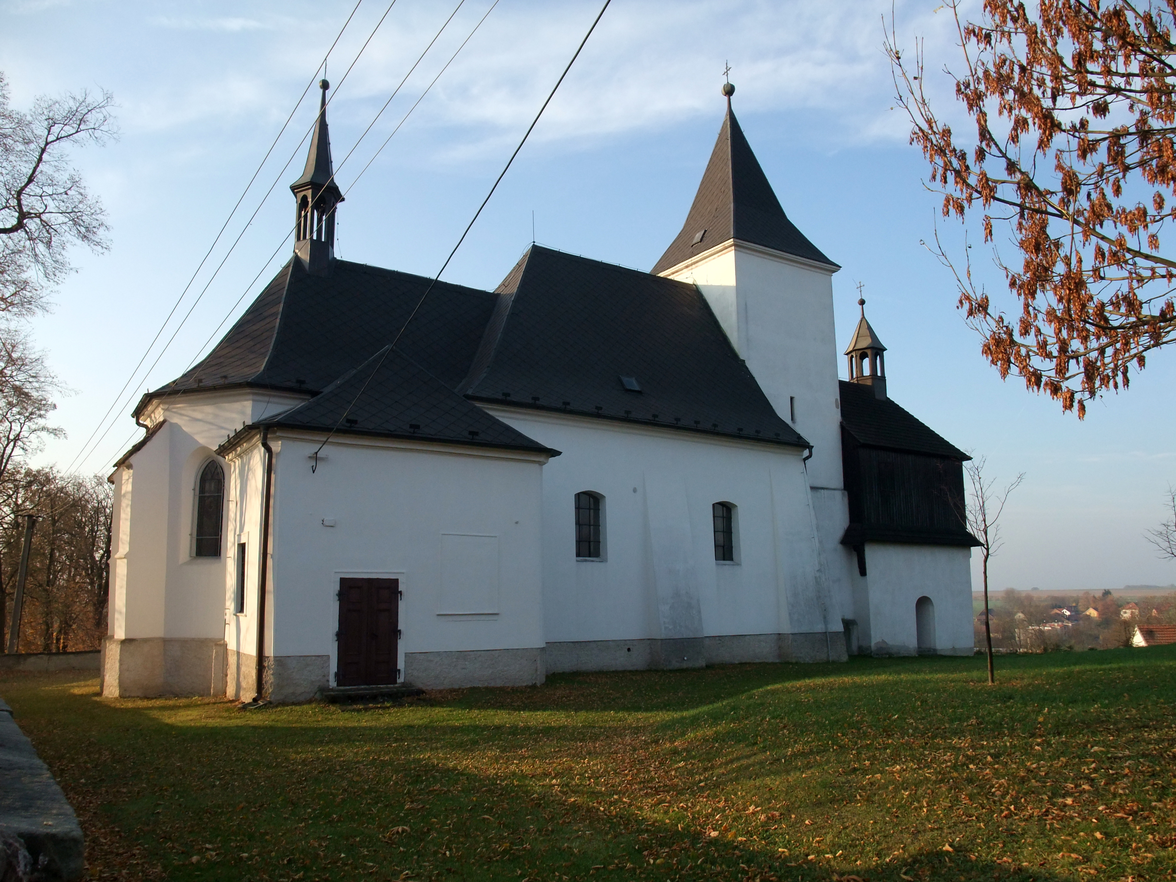 Kostel Nejsvětější Trojice (Jenišovice), Jenišovice